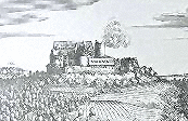 Merian Kupferstich Burg Scharzfels